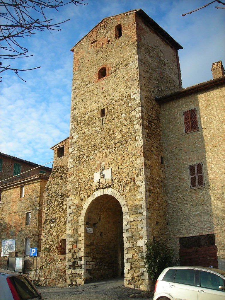 Main gate of Compignanno, Marsciano, Perugia, Umbria, Italy